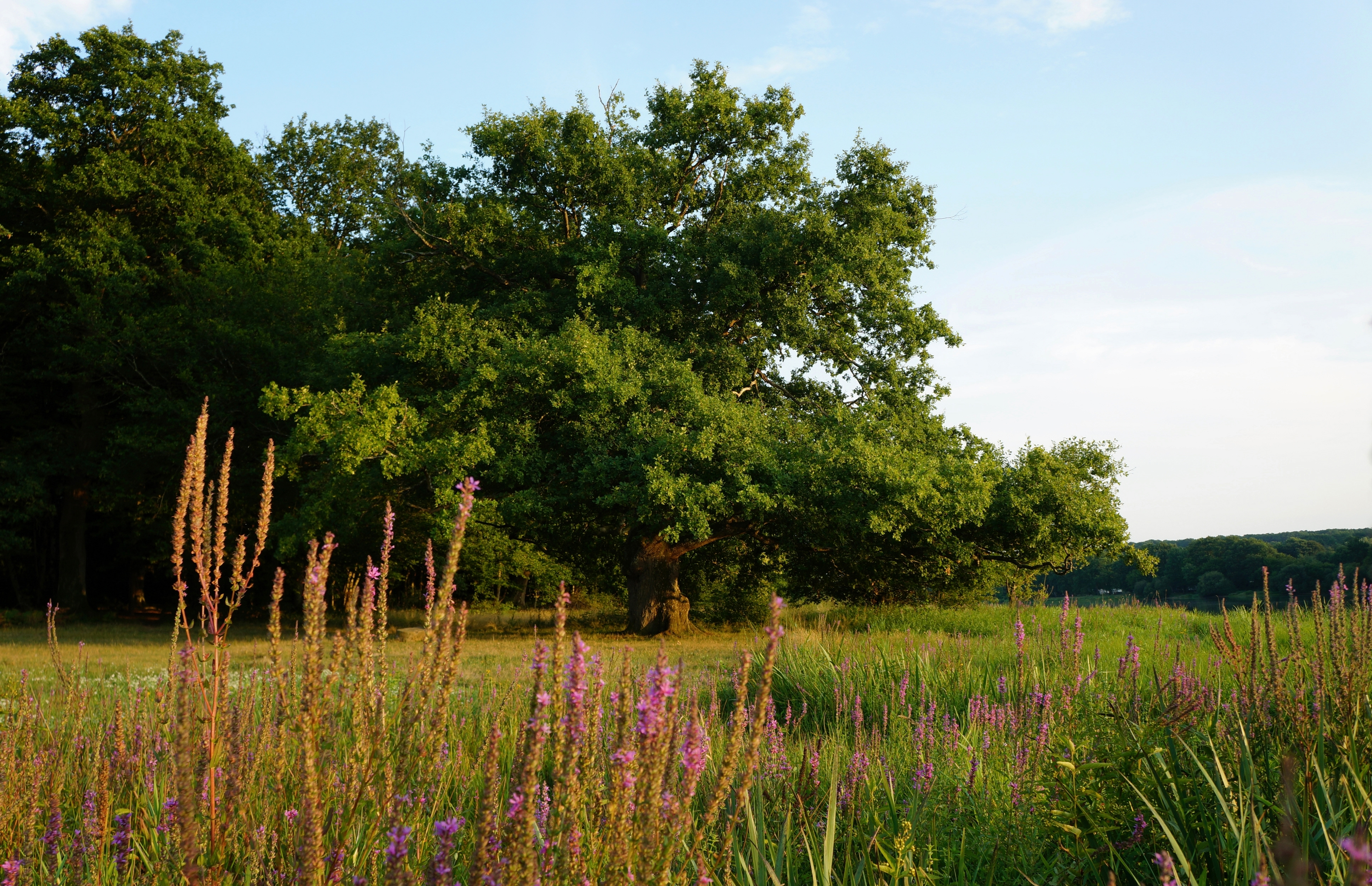 La Forêt de Tronçais est également réputée pour la qualité des bois de ses chênes, qui est utilisé dans la fabrication de tonneaux pour élever les vins. Les arbres de Tronçais ont peu de nœuds, leurs accroissements sont fins et réguliers et la qualité du cru est supérieure et recherché par les tonneliers. Le Chêne de Pirot est l'un des chênes remarquables de la Forêt de Tronçais.